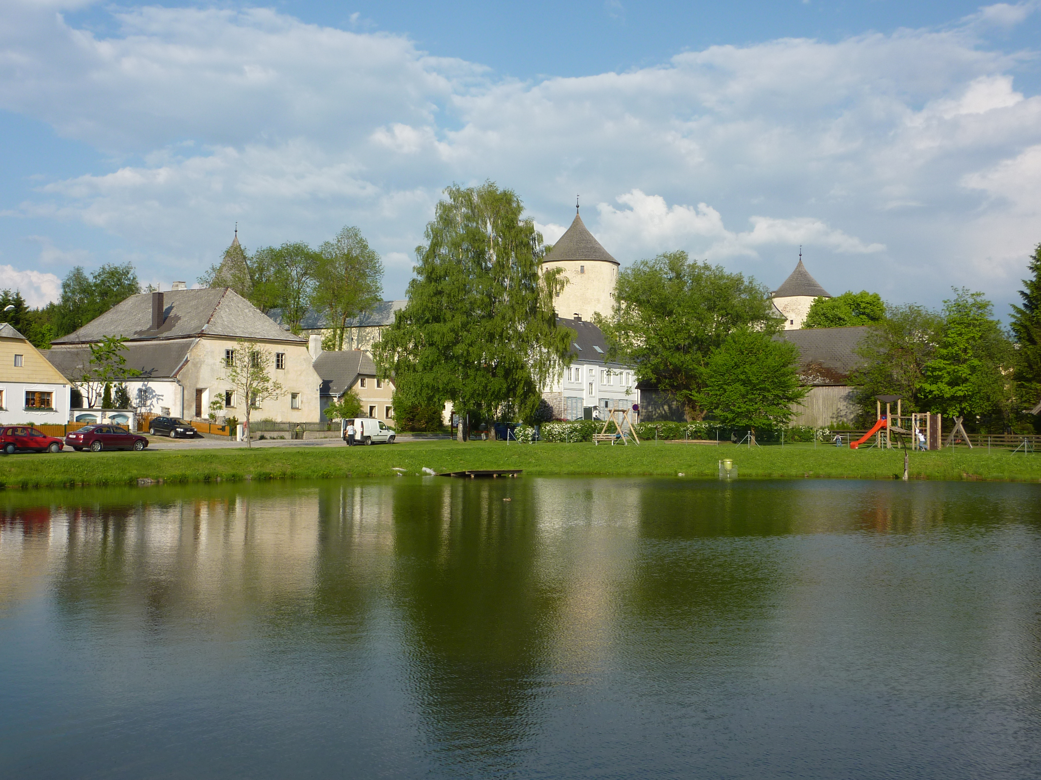 Schloss Ottenschlag, Niederösterreich - Westseite